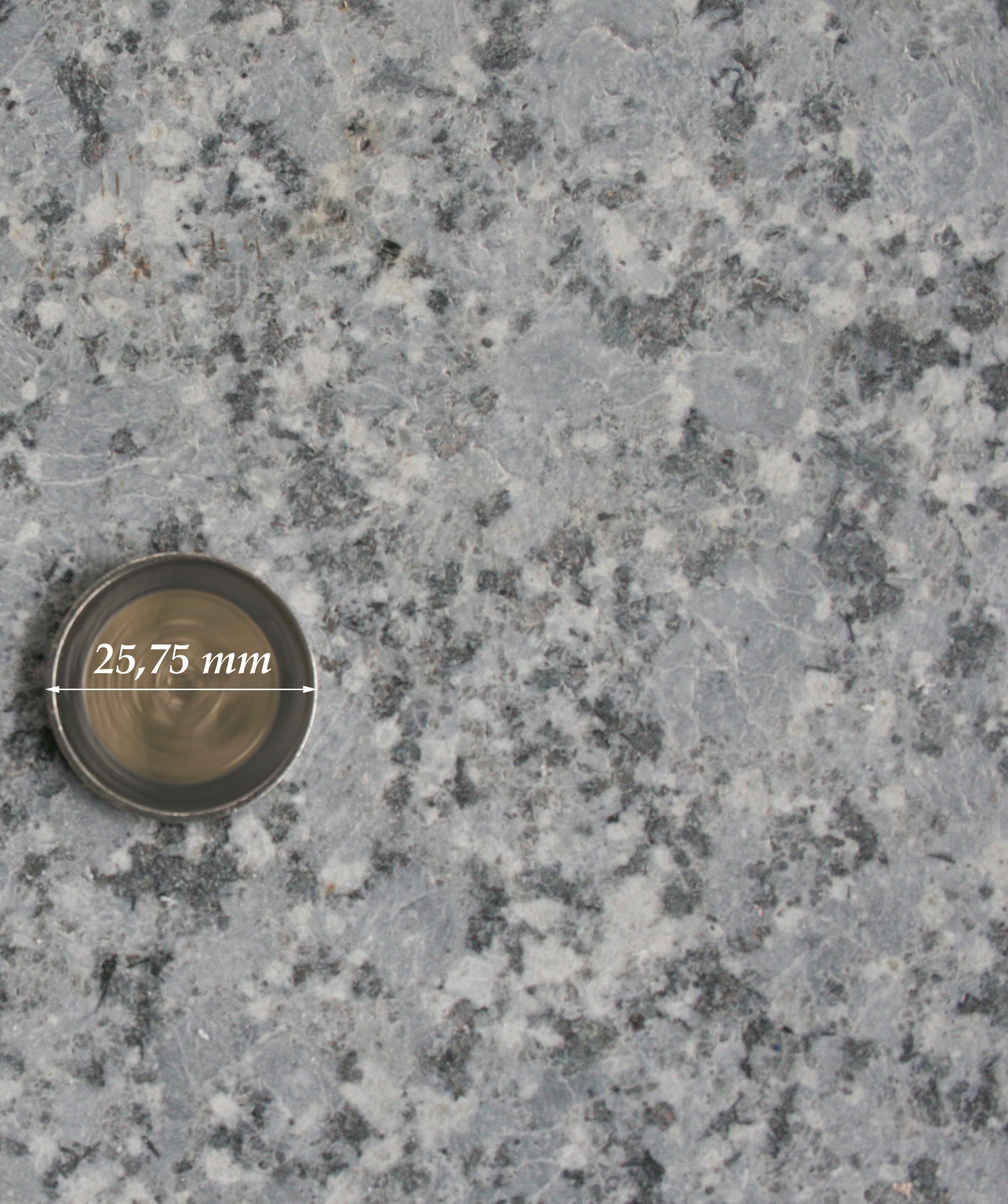 Kösseine, hellblauer Typ